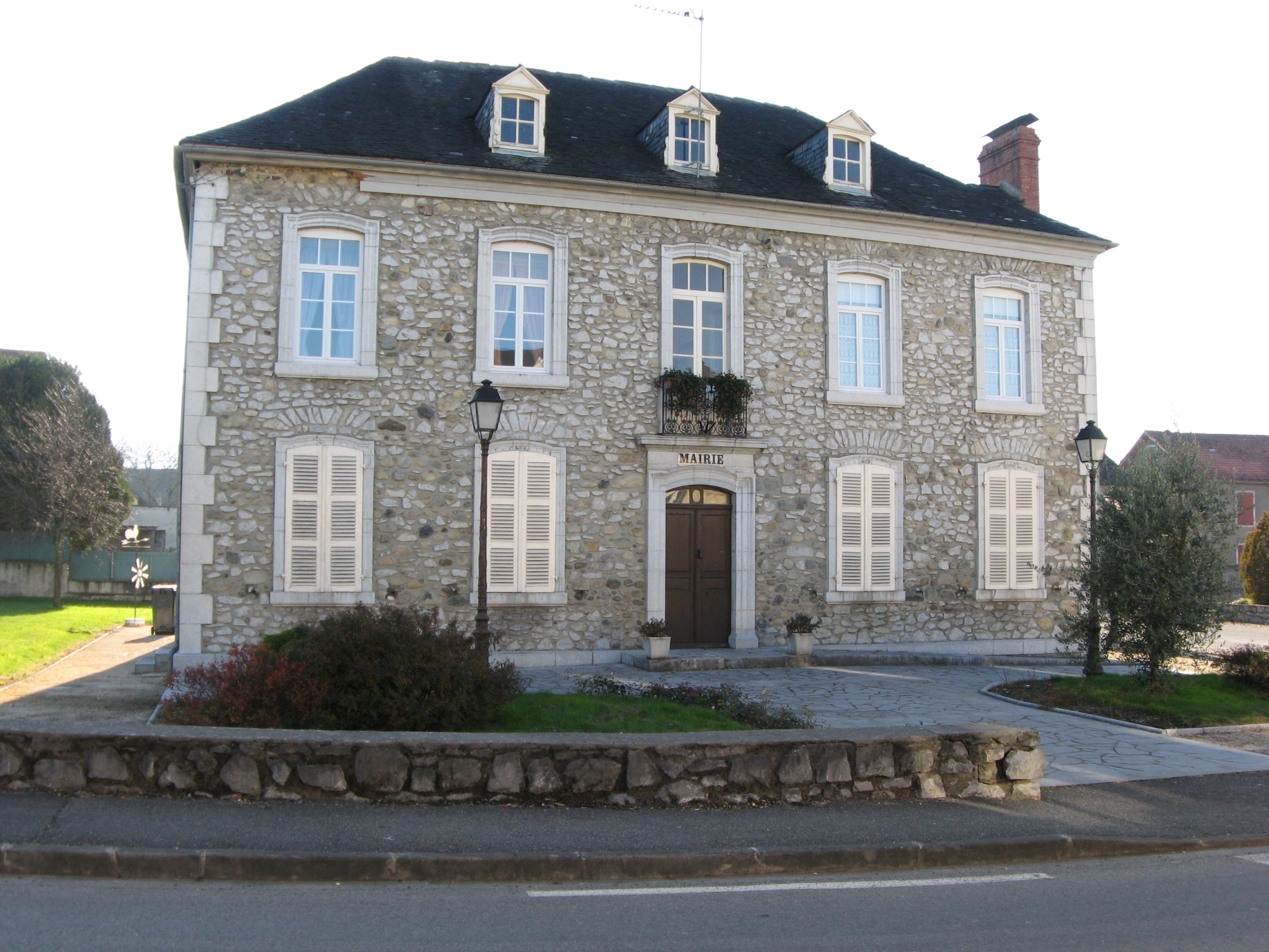 Mairie de Buzy (Pyrénées-Atlantiques) (Pyrénées).